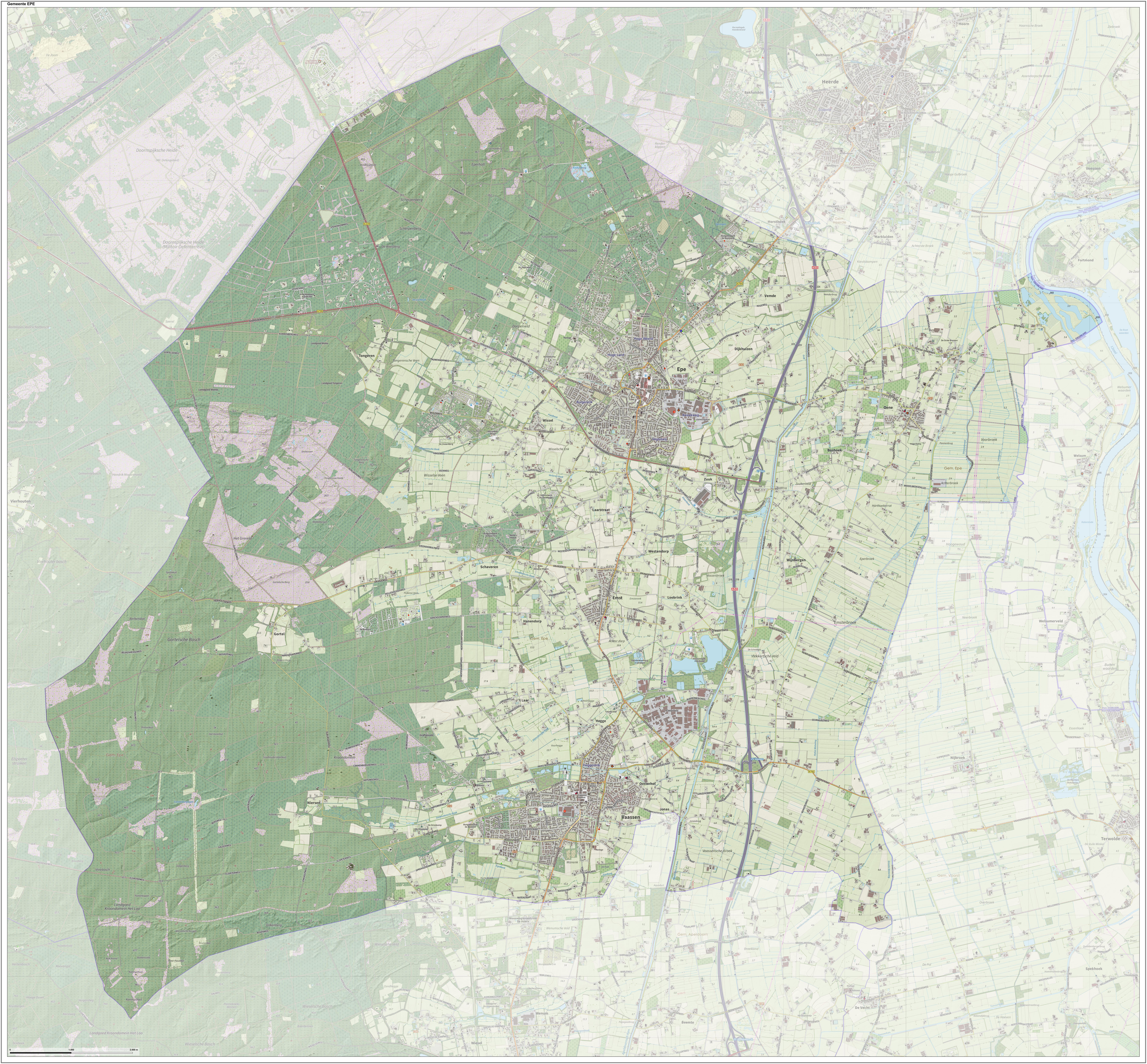 Topografische gemeentekaart. Resolutie: 400 pixels/km. Kaartbeeld samengesteld uit de open geodata van de Top10NL en Top25namen (Kadaster), Creative Commons-BY licentie. Gebouwvlakken uit open geodata BAG extract. Wegen uit de OpenStreetMap, OpenStreetMap community. Reliëfschaduw uit de Actuele Hoogtekaart AHN2. Samenstelling en kleurenschema: Jan-Willem van Aalst, met QGIS. Zie ook de Legenda.